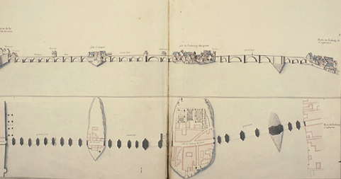 Plan du pont d'Eudes dit Vieux Pont de Tours, extrait de l'album de Nicolas Poitevin, ingénieur des turcies et levées. Fin XVIIe siècle (Bibliothèque municipale, Saumur) Également publié dans Base Mistral/Mémoire